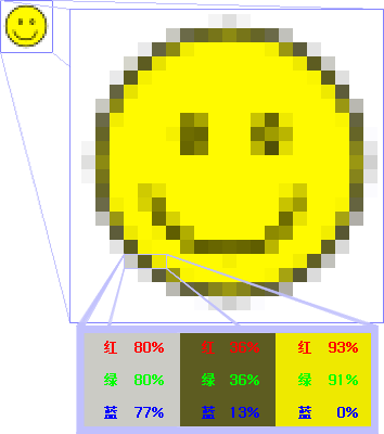 位图放大后的效果